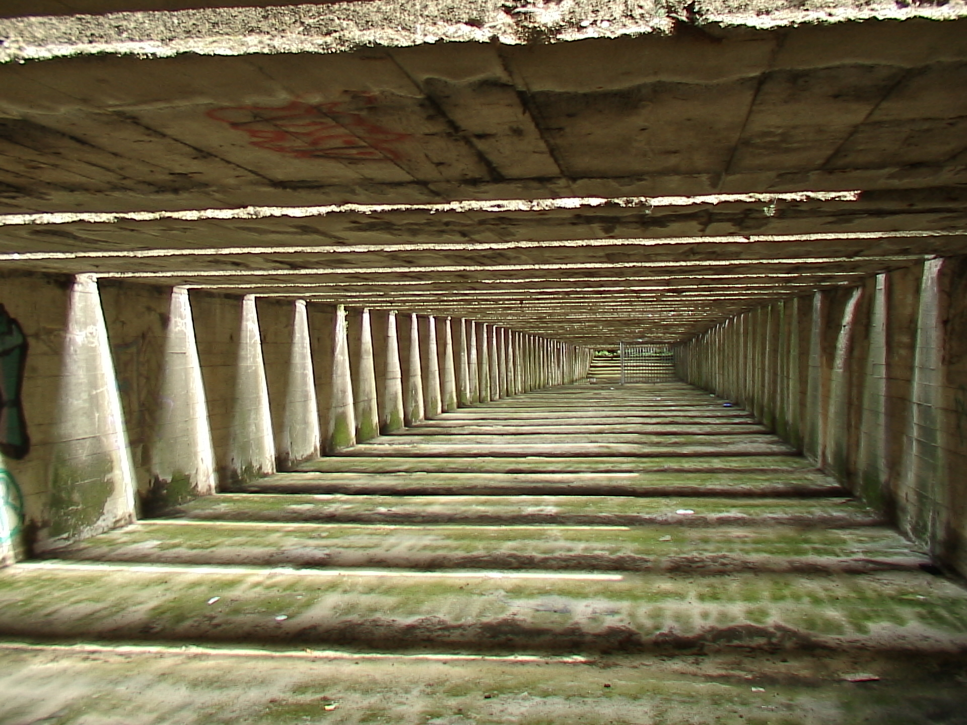 toiture de la base sous marine de Saint Nazaire